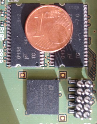 Foto van een geintegreerde flash module gemonteerd op een PCB onder 2 SDRAM modules. Foto is persoonlijk genomen Erpel 27 apr 2005 08:50 (CEST).